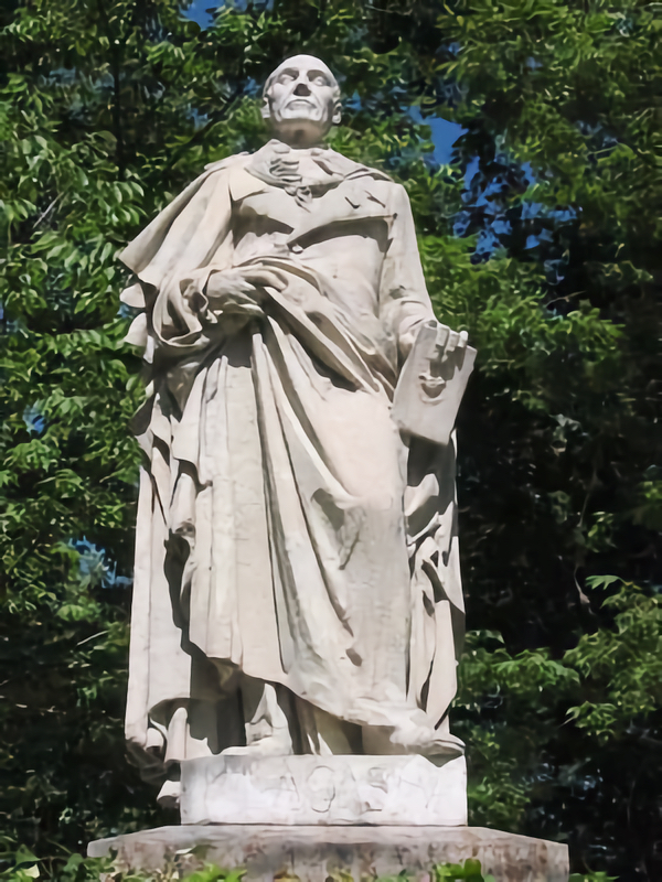 Mariano Lagasca y Segura, Royal Botanical Garden, Madrid. Imagen tomada de Enciclopedia Universal Libre en español : Fotografía de Usuario:P40p